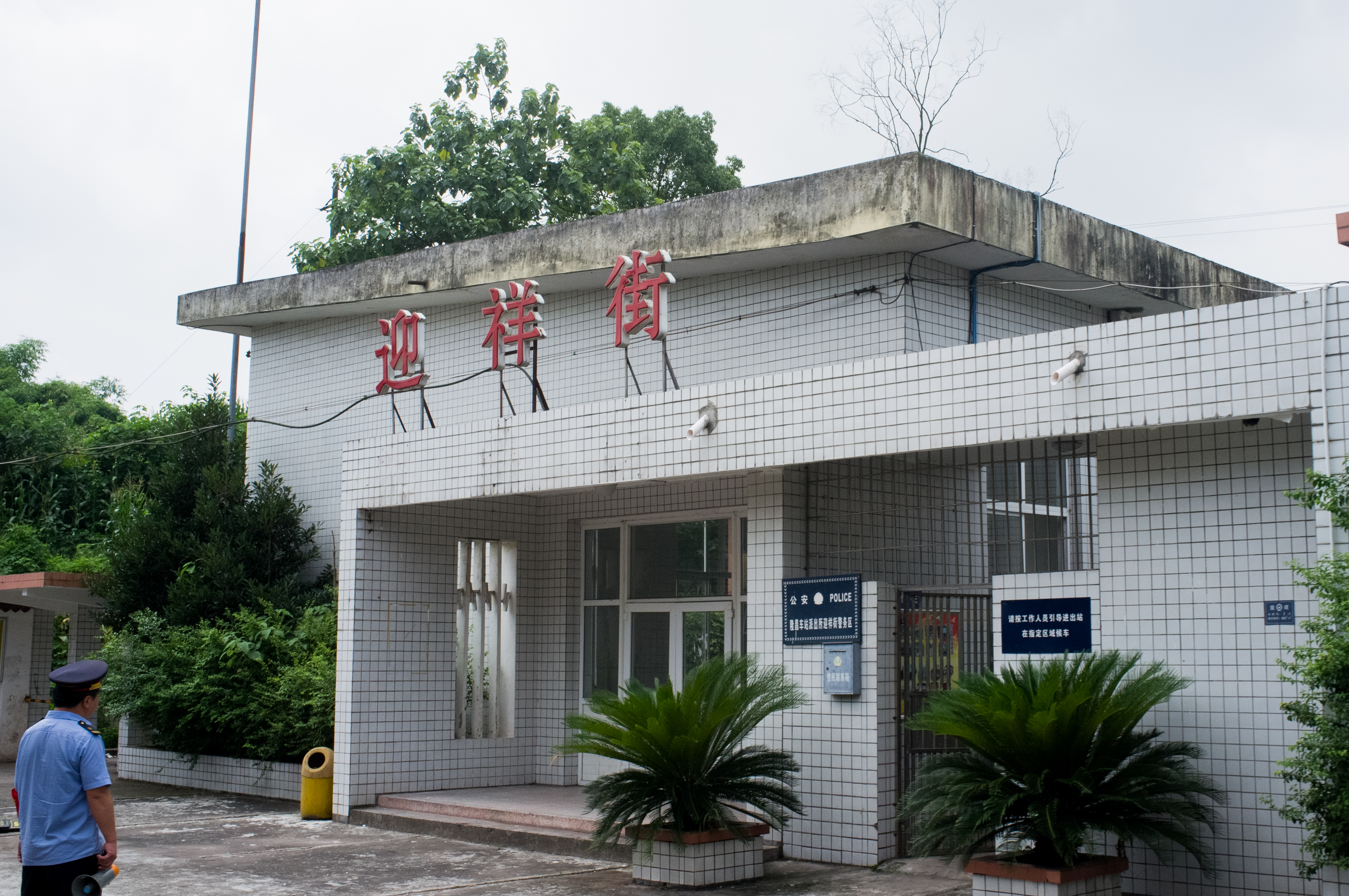 中文（中国大陆）: 成渝铁路迎祥街站